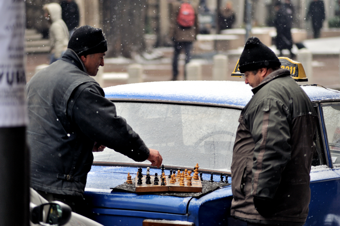 Foto: CC-BY-SA Wolfgang Klotz, Heinrich-Böll-Stiftung Länderbüro Serbien